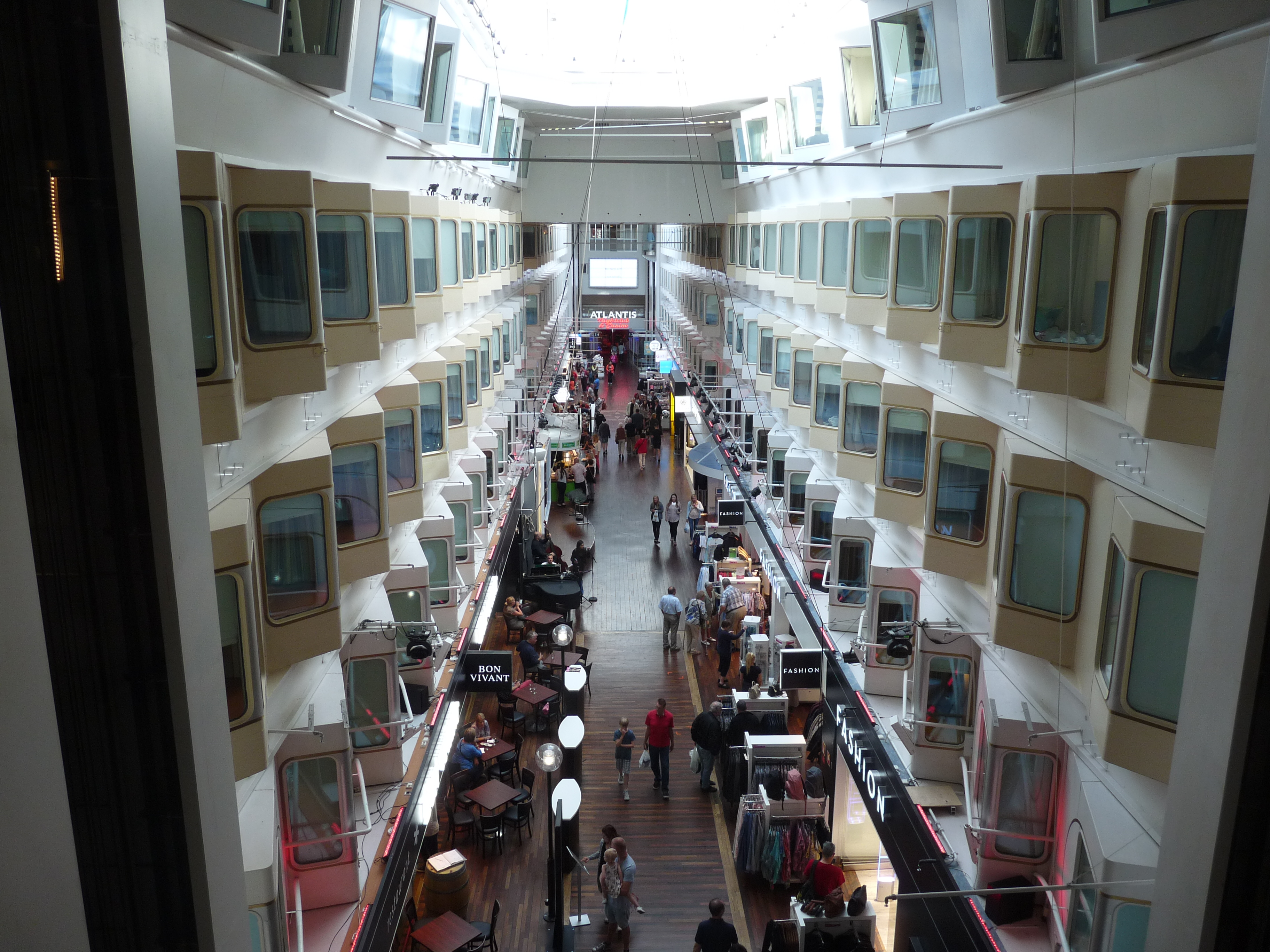 Silja Serenade tussen Stockholm en Helsinki